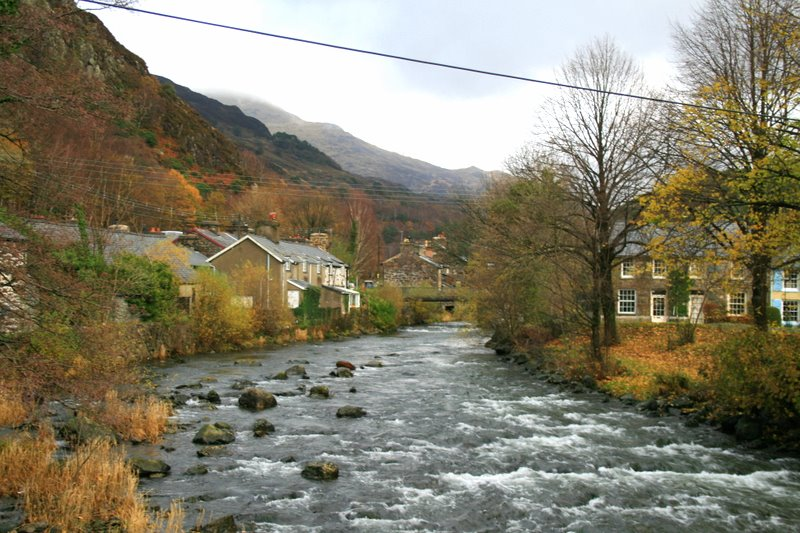 Beddgelert, Snowdonia, Wales